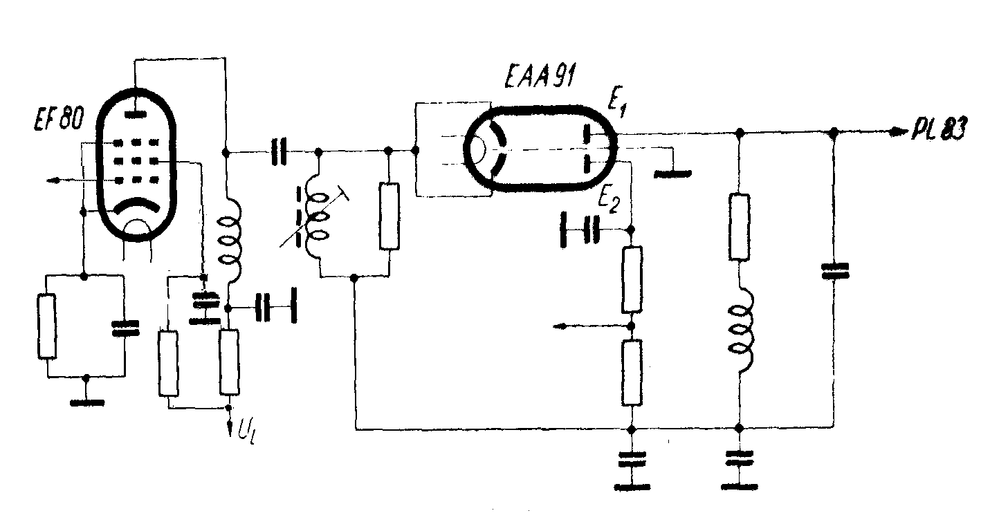 TV demodulator